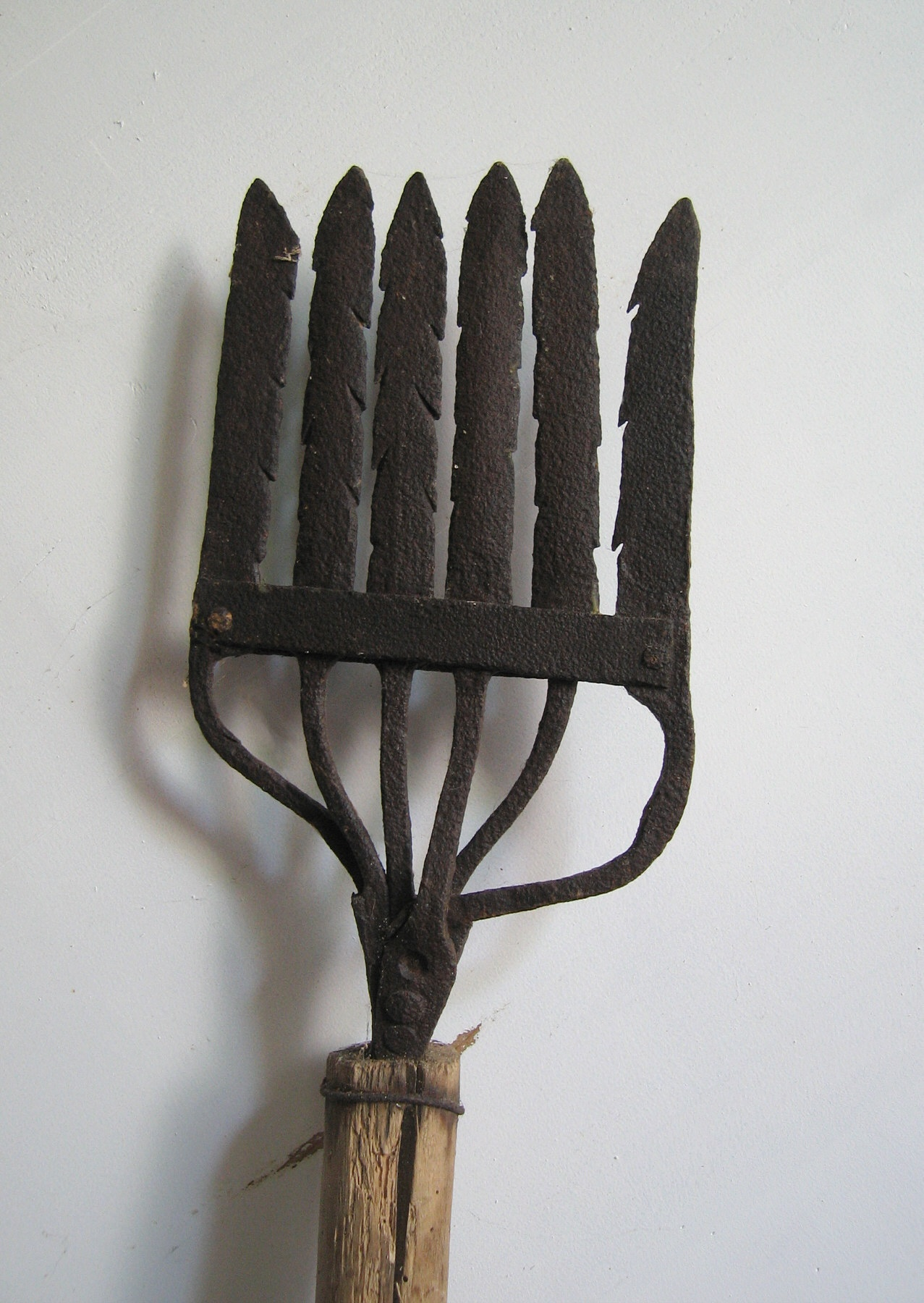 Aalstecher